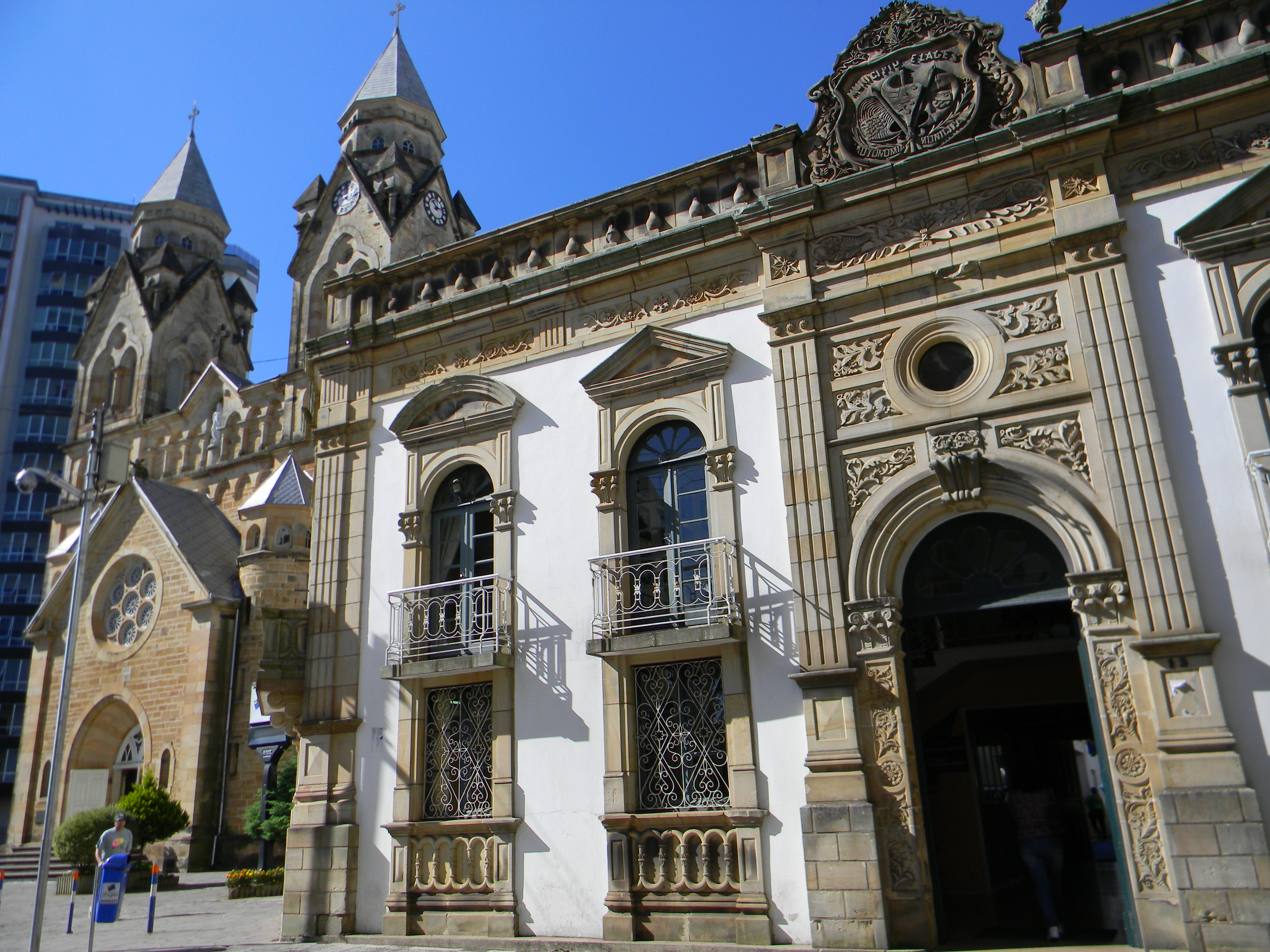 Centro, Lages - SC, Brazil